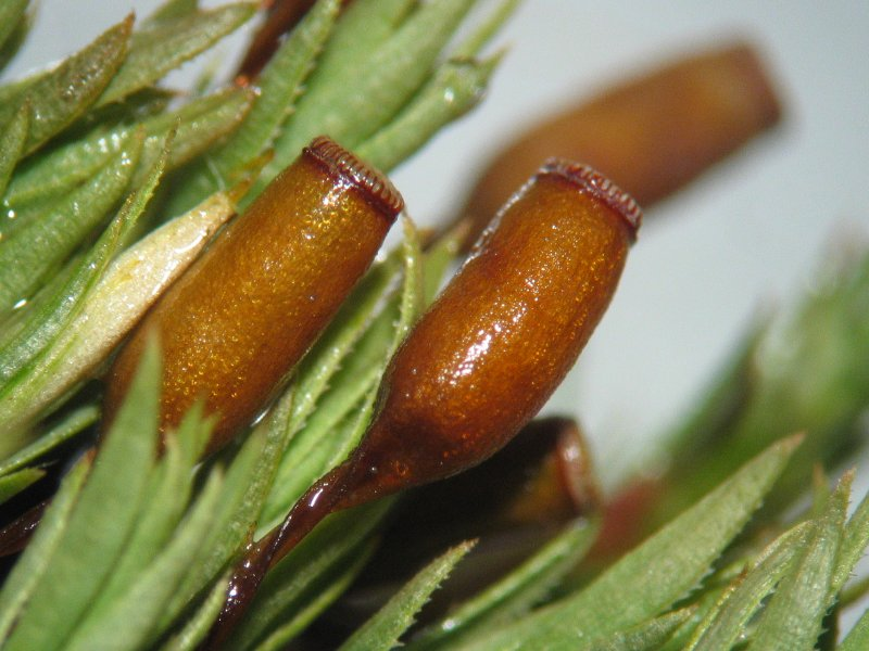 Große Filzmütze (Pogonatum urnigerum), Sporenkapseln, ~30x vergrößert